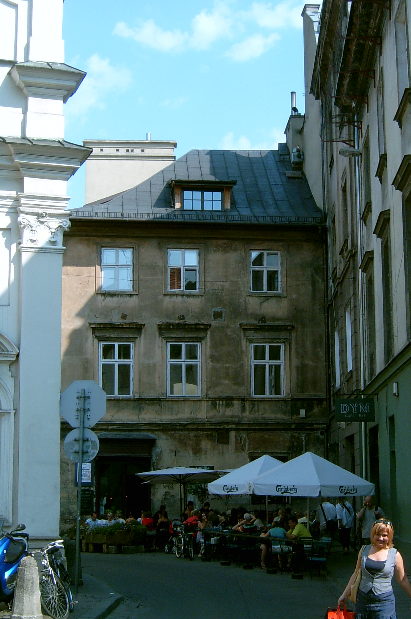 Kraków, Poland